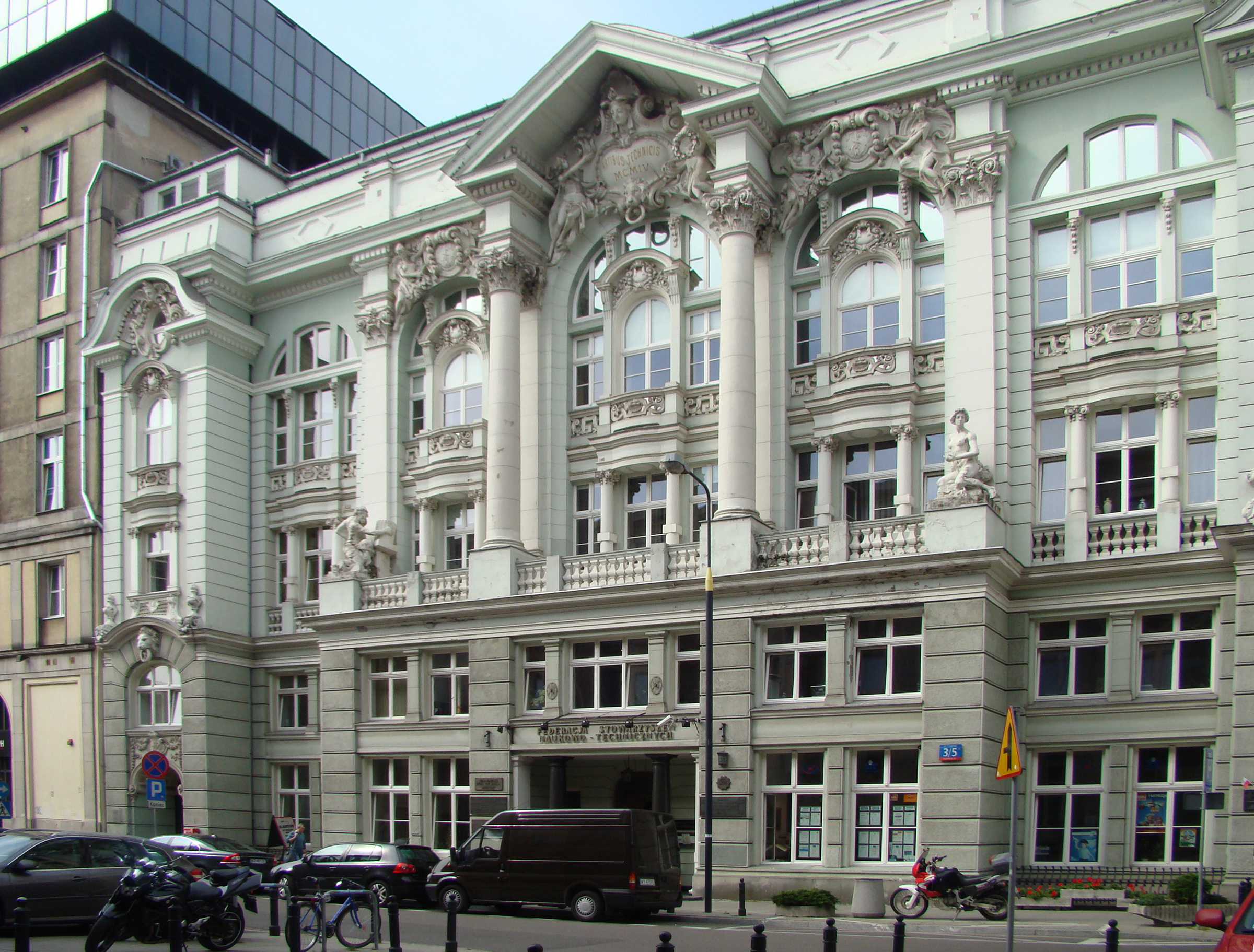 NOT - Warszawa, Czackiego 3/5